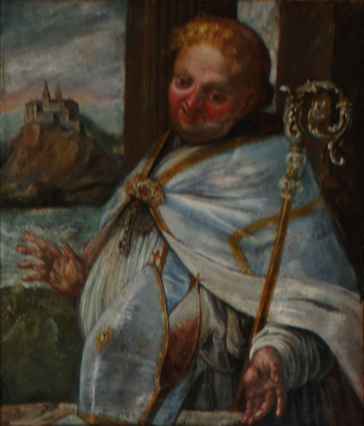 Porträtgemälde von Dracholf, Bischof von Freising, im Fürstengang zwischen Fürstbischöflicher Residenz und Freisinger Dom.